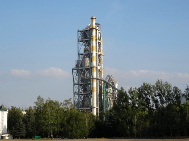 Cementownia Kujawy w Piechcinie k. Barcina, woj. kujawsko-pomorskie